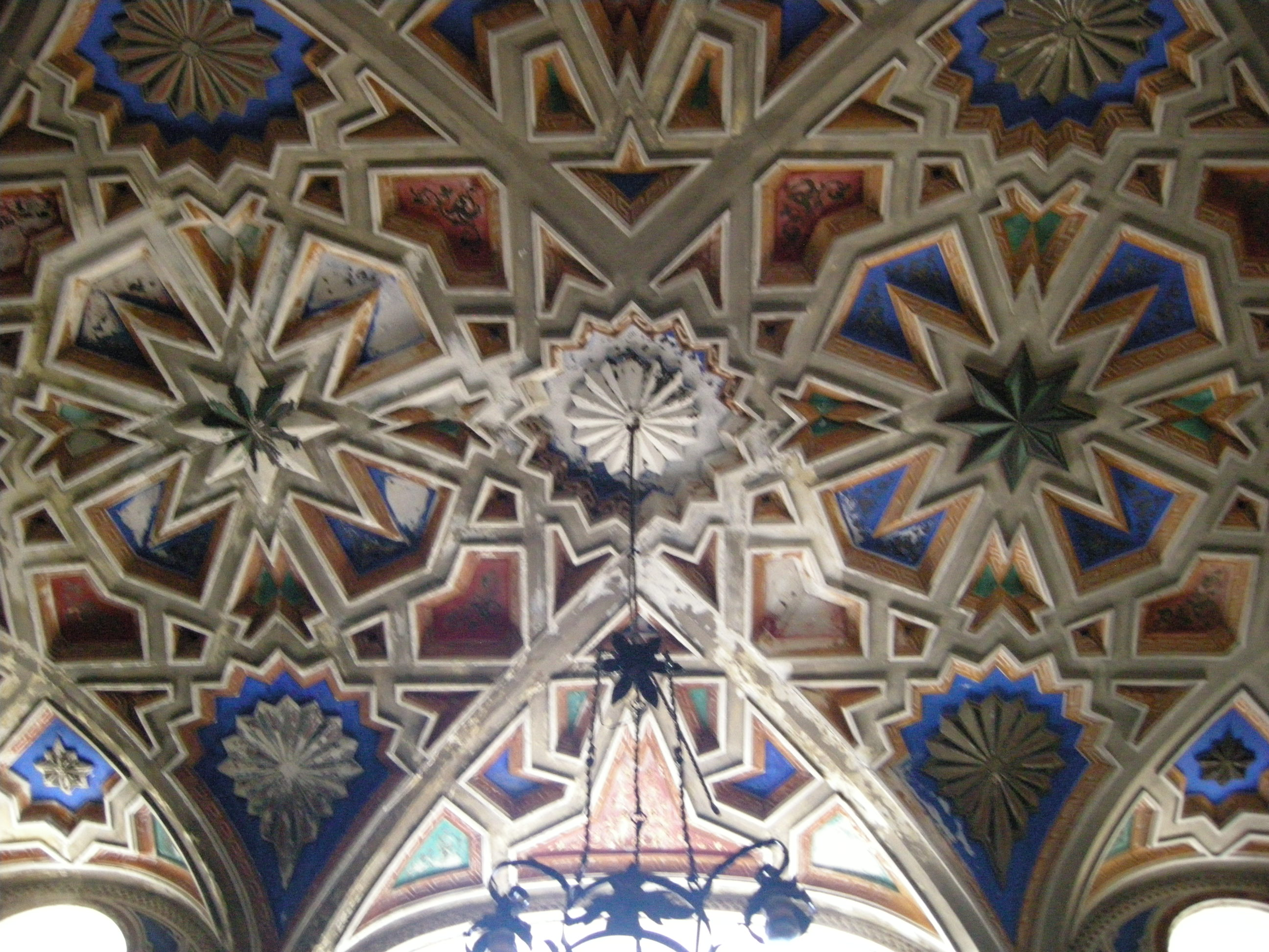 Sammezzano, sala 19